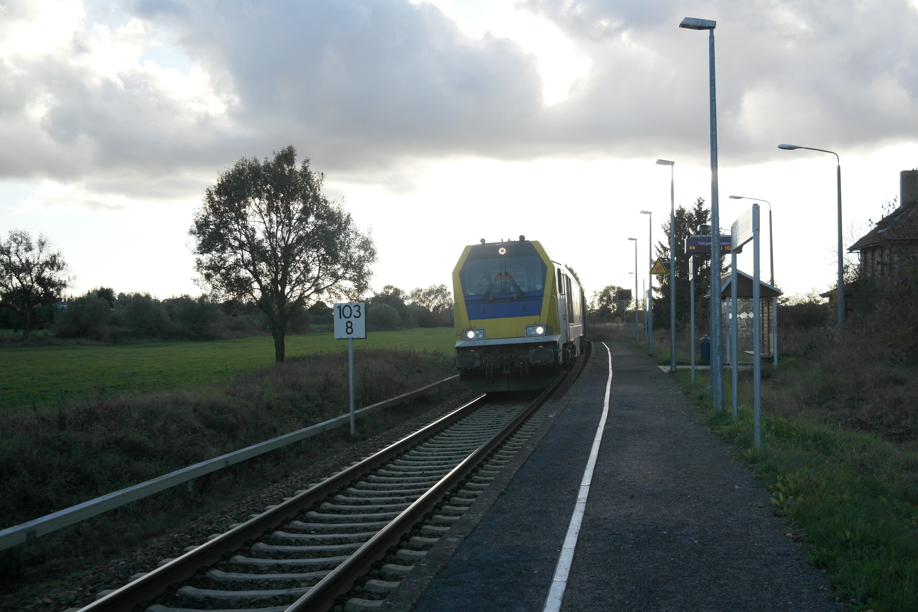 Bahnhof Petershagen (Uckermark), Bahnsteig